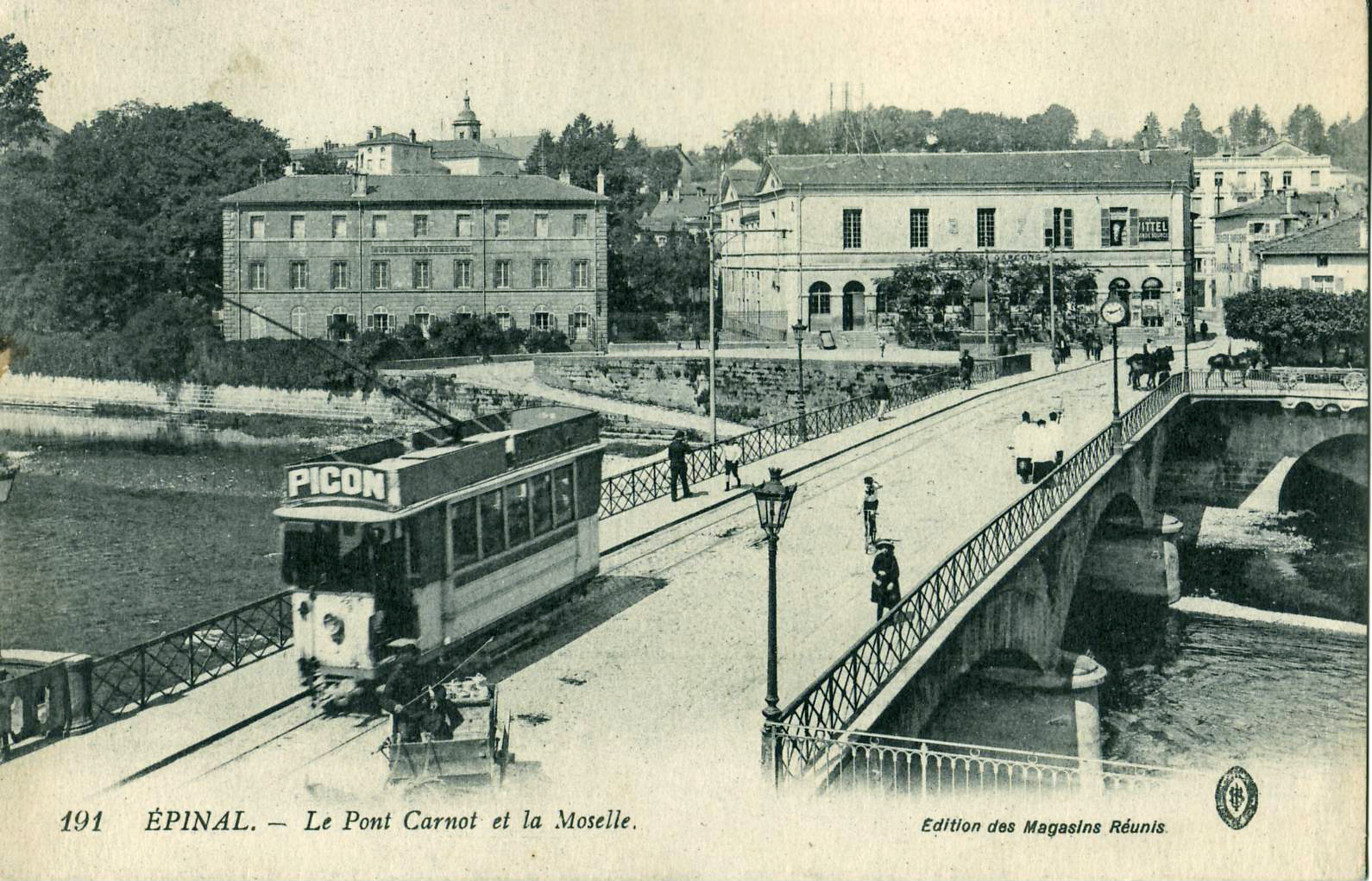 Carte postale ancienne éditée par Éditions des Magasins Réunis, n°191 : ÉPINAL - Le Pont Carnot et la Moselle